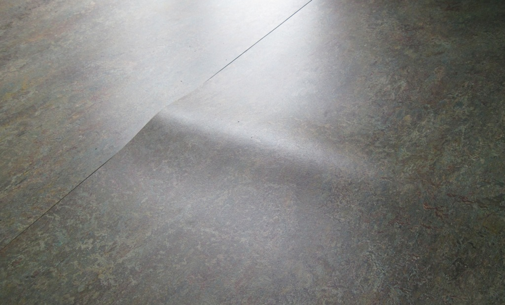 Produktionsbedingte "Hängebeule" von FORBO-Linoleum, entstehend beim Reifeprozeß des Belages in der Reifekammer